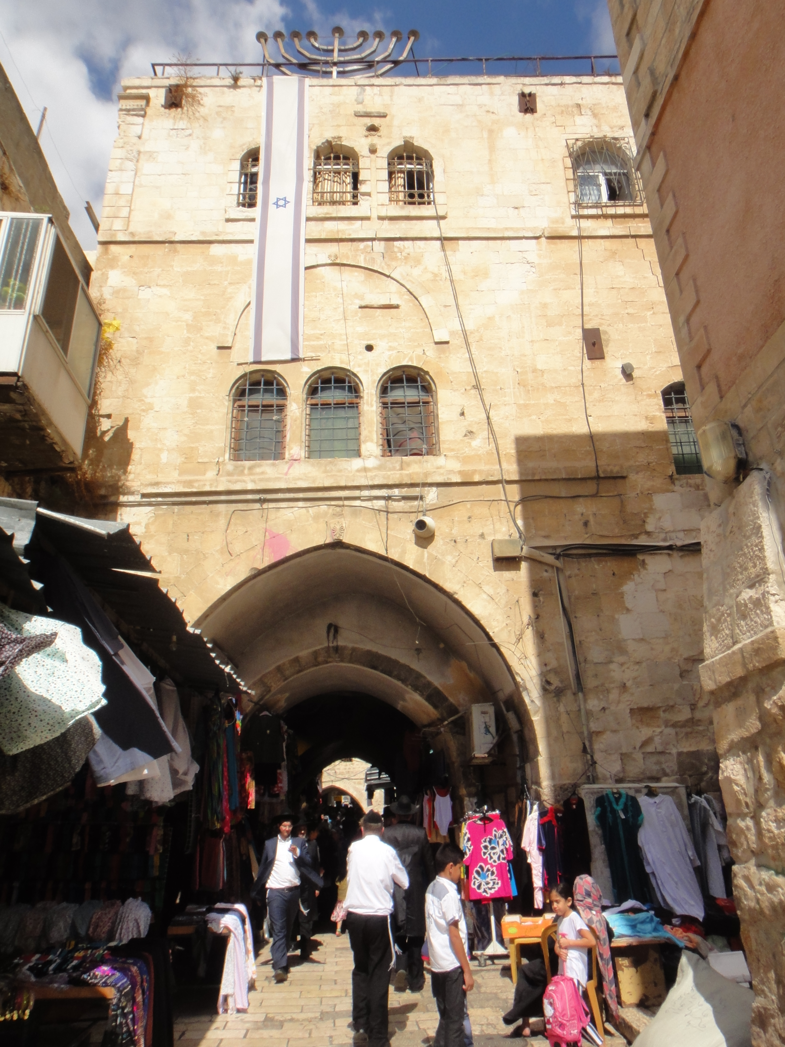 בית ויטנברג